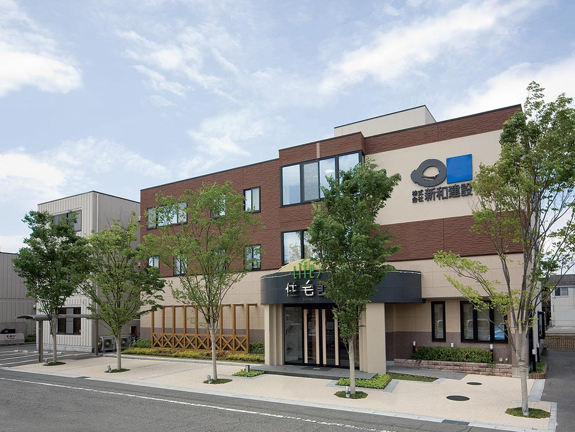 株式会社新和建設の名古屋本店